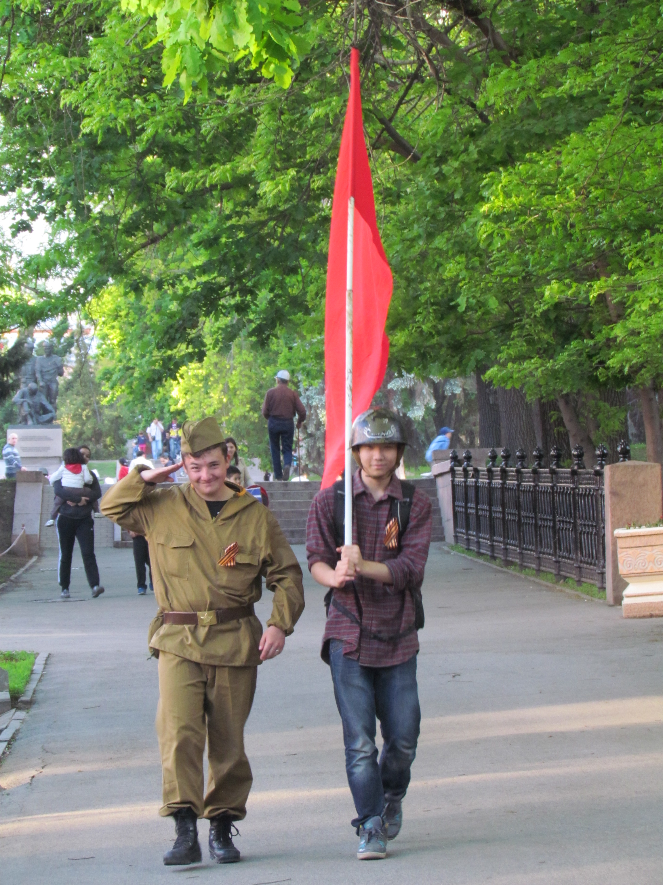 Празднование 9 мая в Алма-Ате (Казахстан). 2013 год.